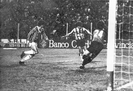 Nota completa da partida Estudiantes 3 - Grêmio 3. El Gráfico (12 de Julho de 1983) Edição 3327.